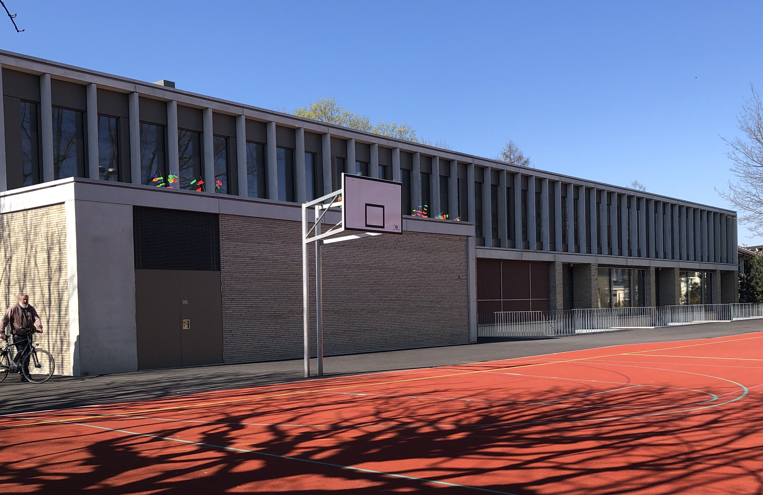 Stapfenacker Schule Neubau